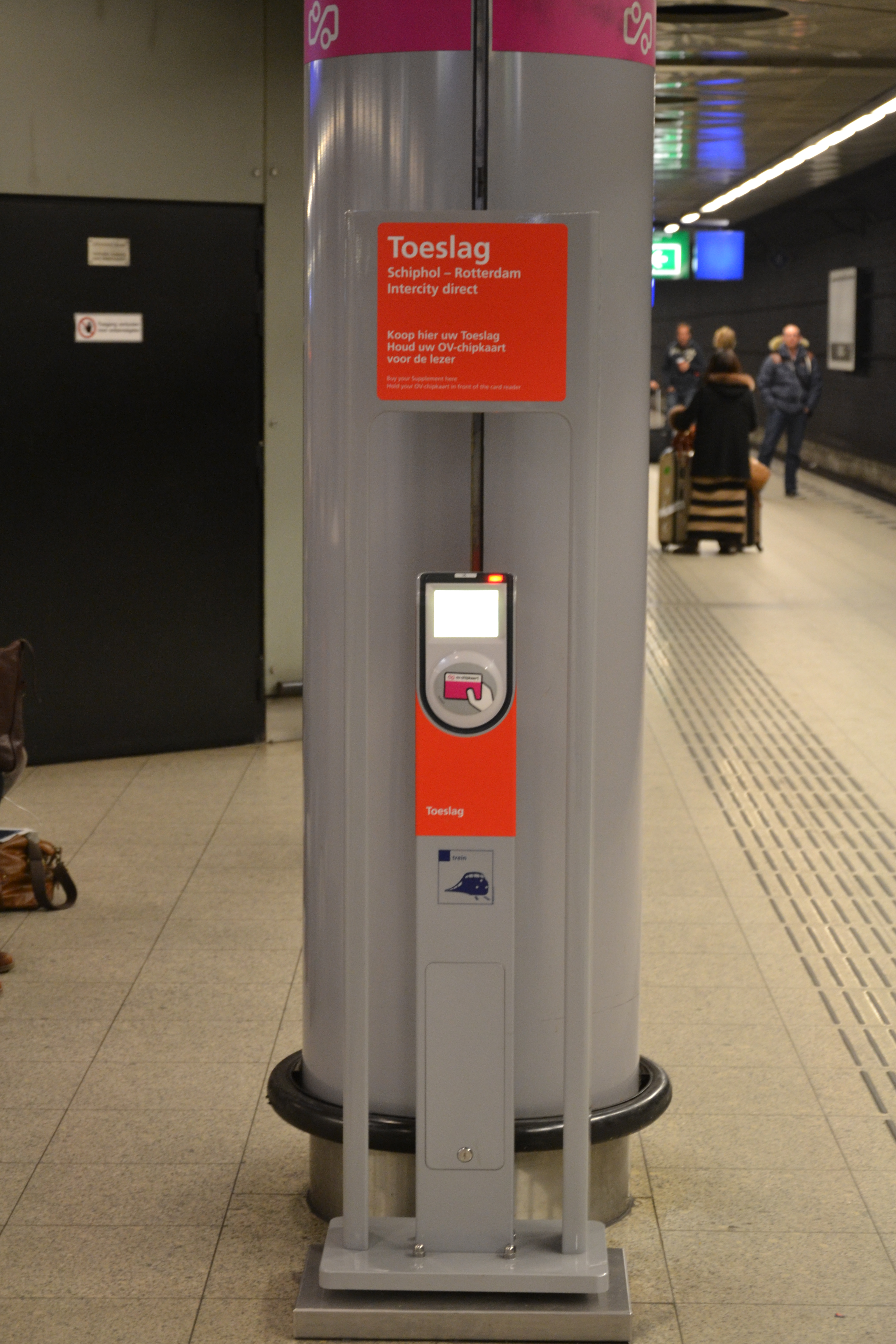 Een toeslagpaal voor de Intercity direct, de nieuwe naam voor de Fyra Amsterdam C. - Breda, op station Schiphol.